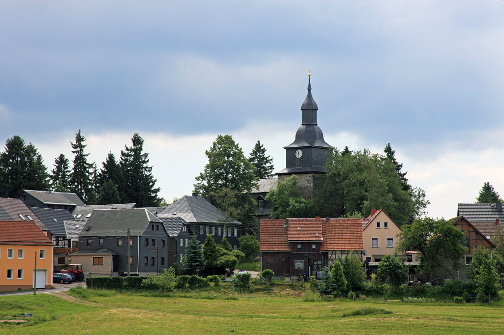 Braunsdorf, Saalfelder Höhe, Ansicht von Nordwest